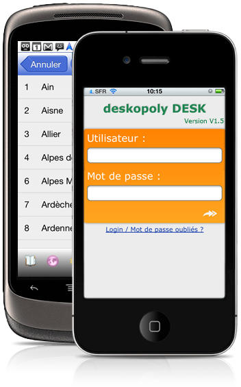 deskopoly DESK pour mobiles et tablettes